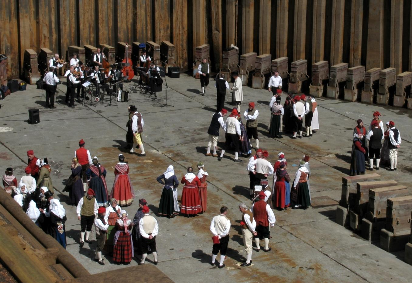 åbent hus frederikshavn havn 13. juni 2009, orkester i tørdok 4, Orskov Yard